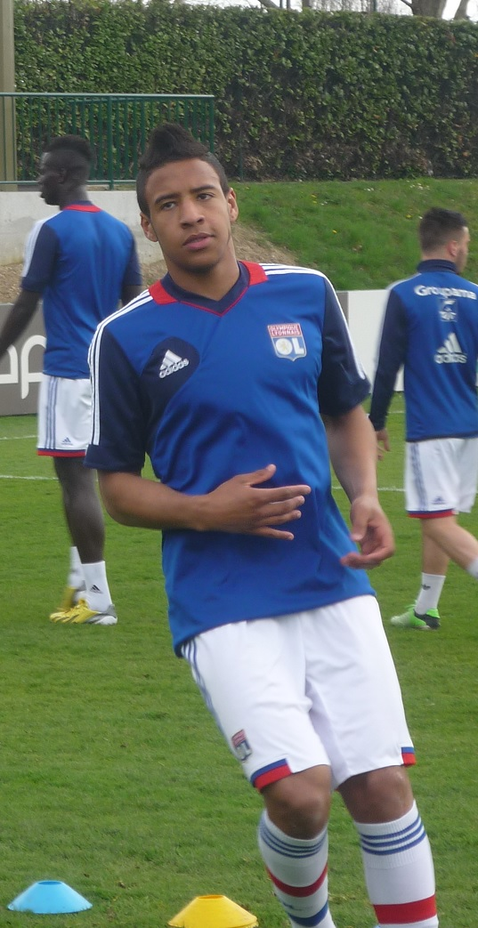 Corentin Tolisso, joueur de l'Olympique lyonnais, à l'entrainement en avril 2013